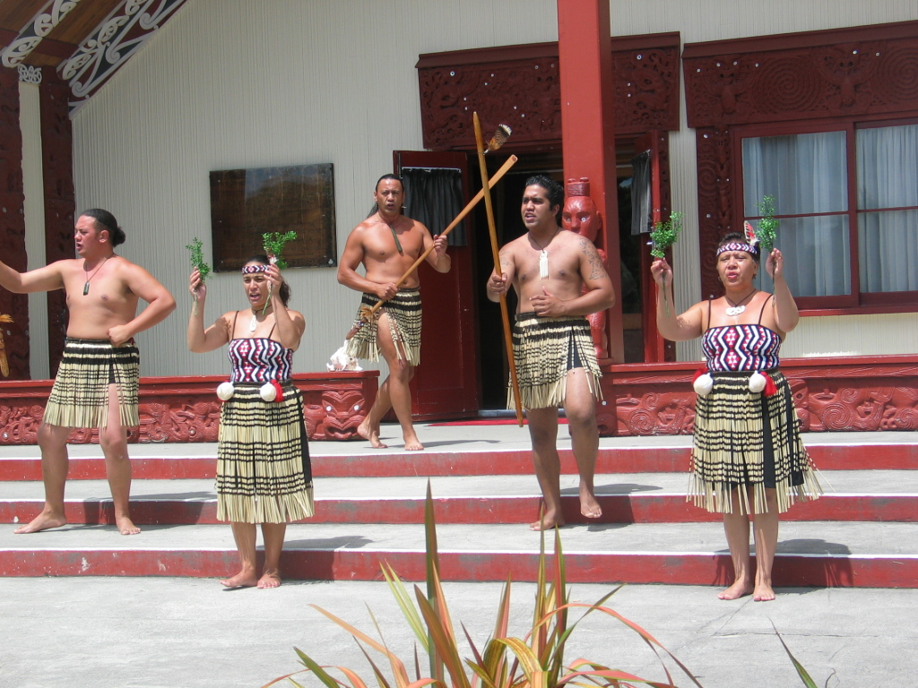 Eigen foto van een (in scene gezet) welkom door Maori's in Rotorua, Nieuw Zeeland